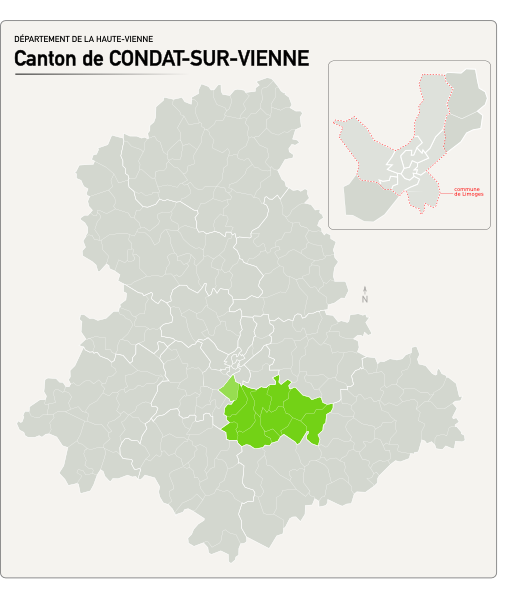 Carte du nouveau canton de Condat-sur-Vienne.